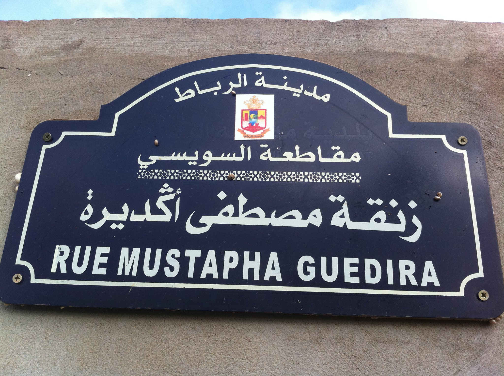 علامة زنقة مصطفى اكديرة بحي السويسي في الرباط